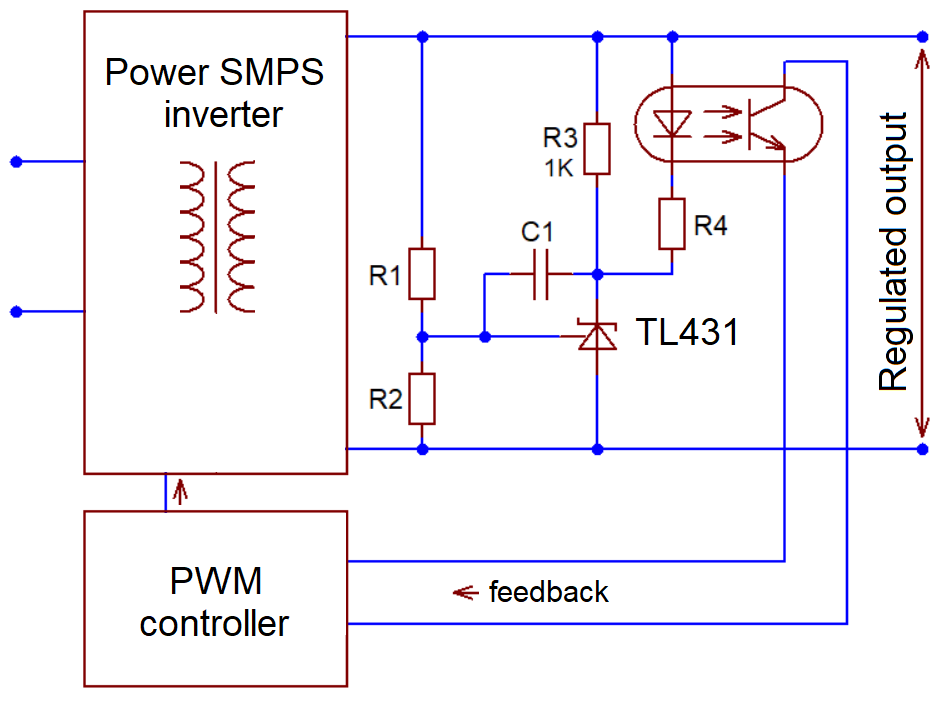 Typical use of TL431 in optocoupled regulated SMPS